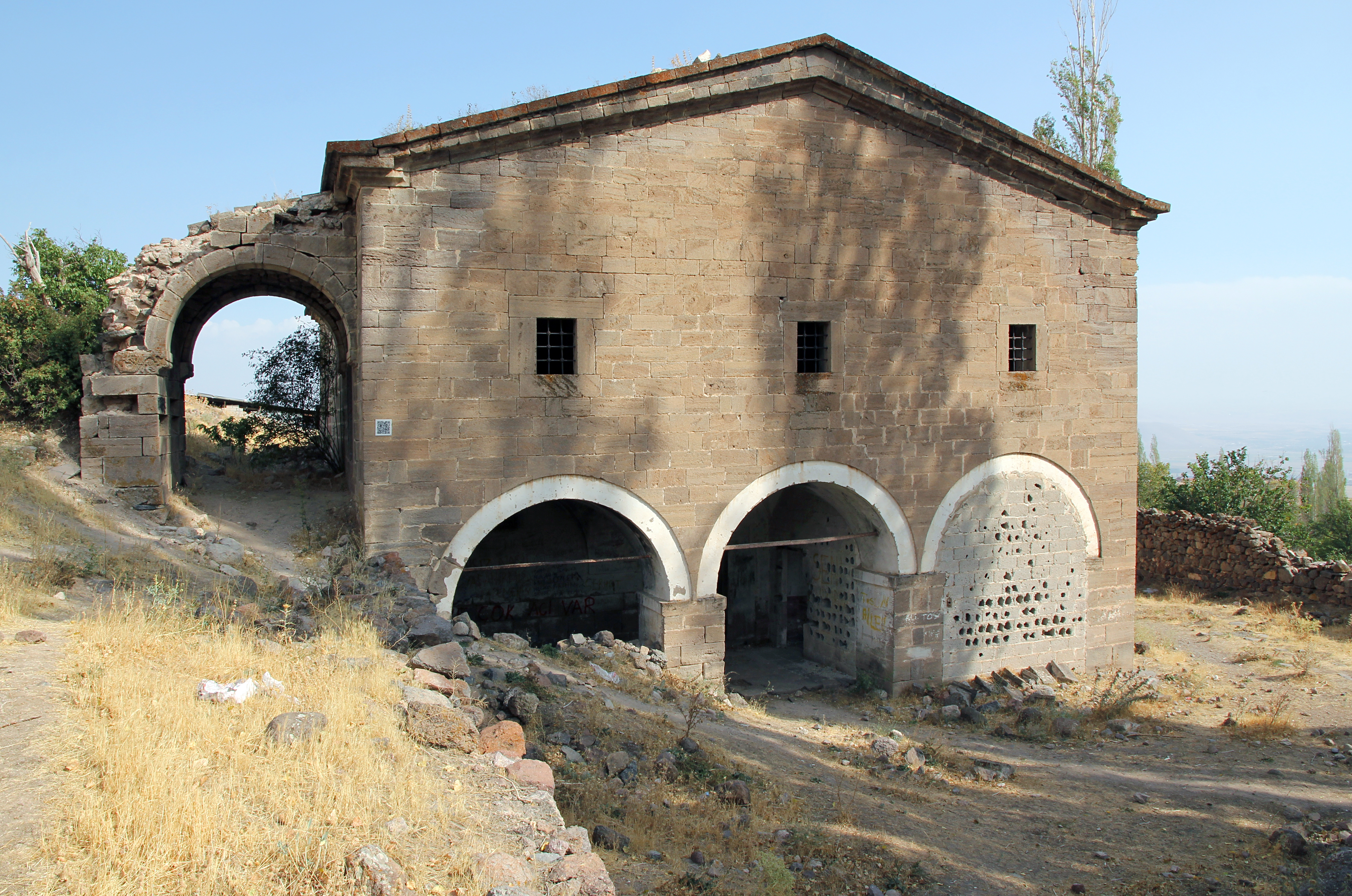 Kirche von Küçükköy bei Niğde, Türkei, Ansicht von Westen